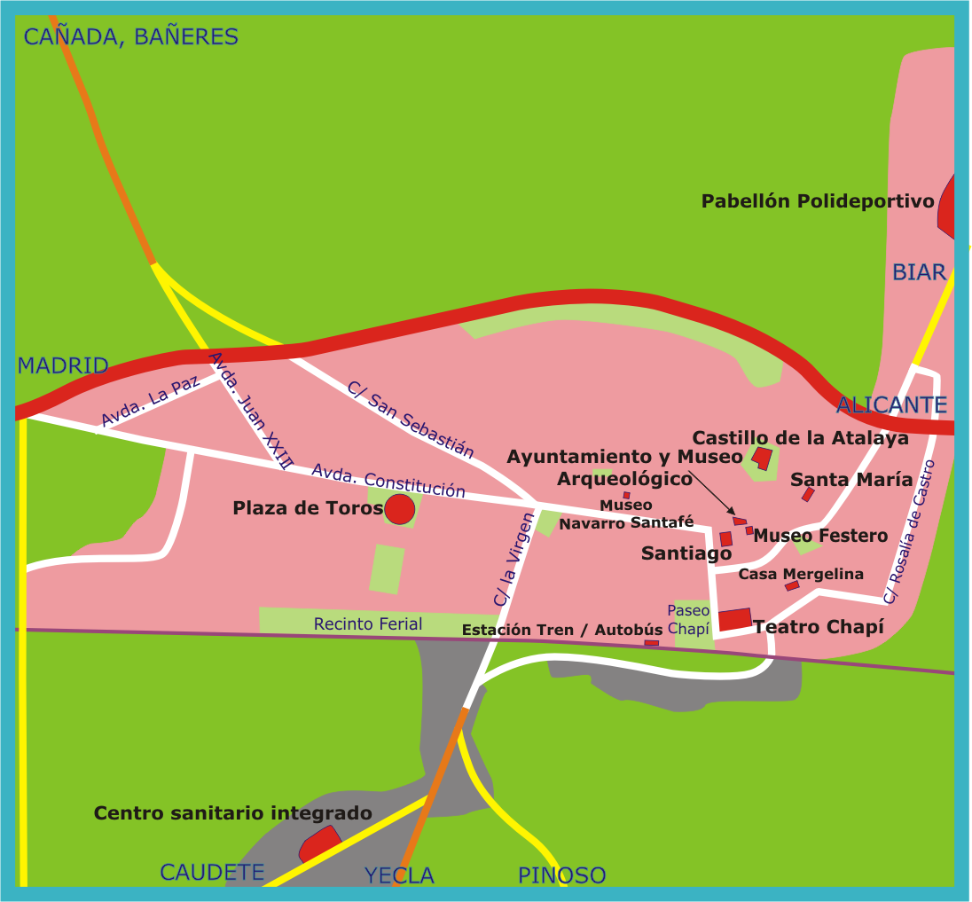 villena y sus accesos y monumentos